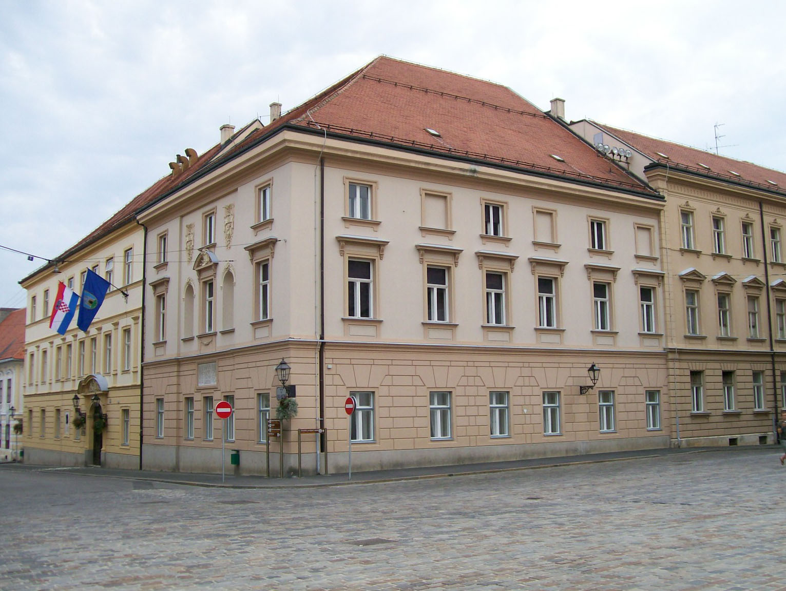 Stara gradska vijećnica u Zagrebu